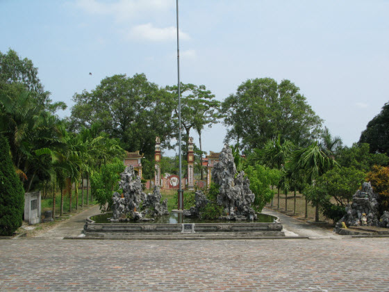 Khu đền thờ cụ Quách Hữu Nghiêm tại xã Thái Tân, Thái Thụy, Thái Bình.